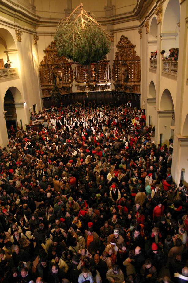 Pi penjant dins l'església de Sat. Coloma. Festa del Pi (Centelles-Osona-Catalunya)